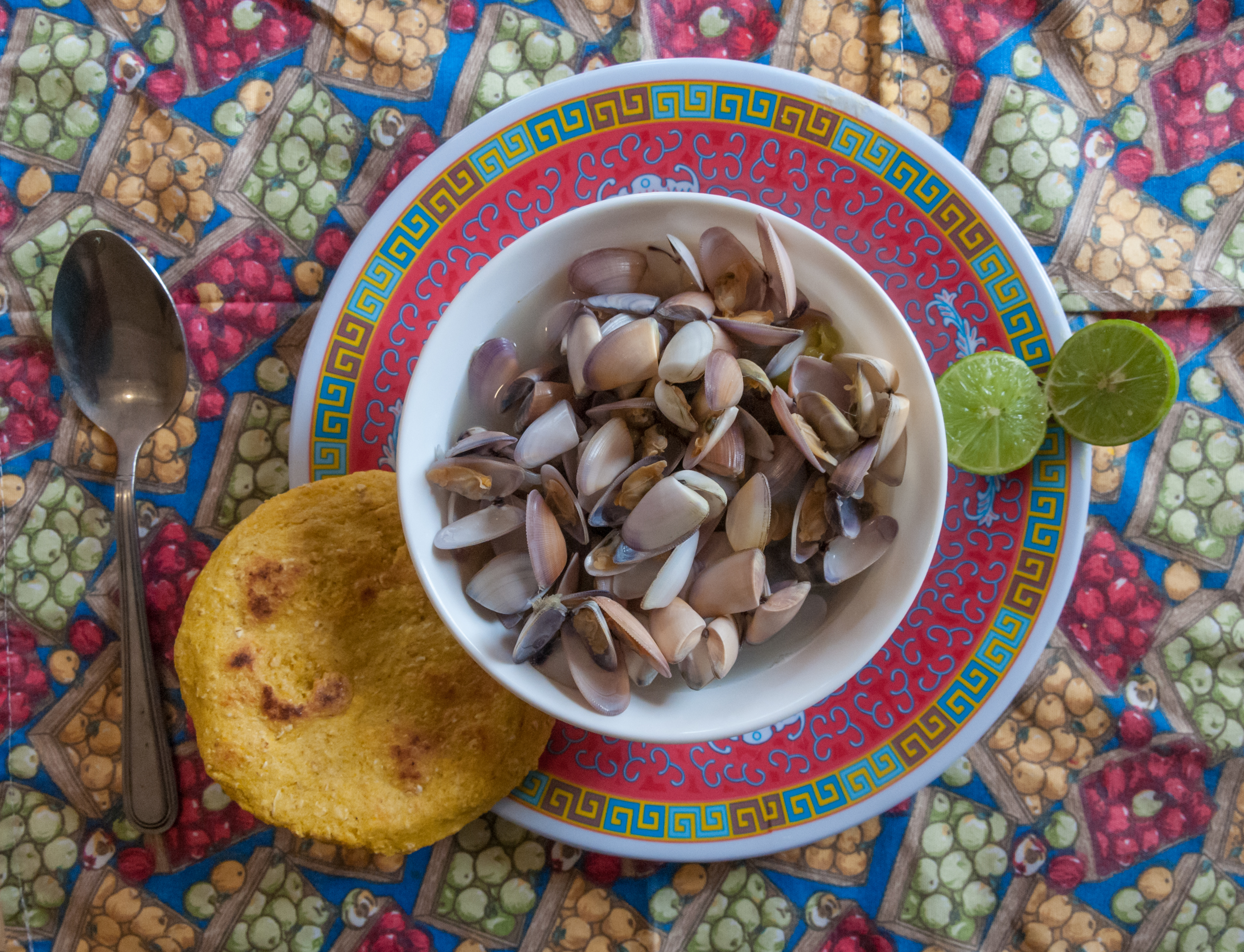 Sopa de chipichipi con Guaguco y Arepa